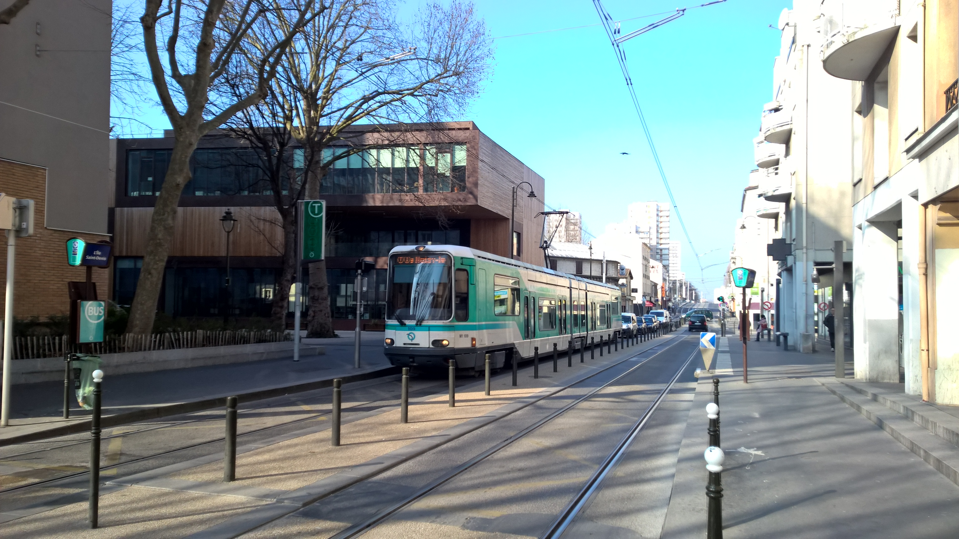 Tramway T1 sur la rue Méchin (ex RN 186) à l'Ile-Saint-Denis.La rue est banalisée, et les véhicules circulent sur l'emprise du tramway.Le bâtiment sombre au second plan est la médiathèque de Plaine Commune / École municipale des Arts